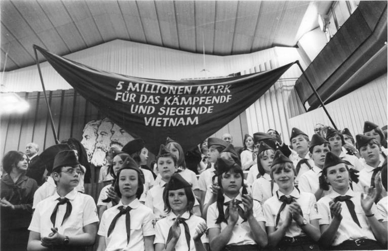 ADN-ZB Kollektiv 19-6-71-ba Berlin: VIII. Parteitag der SED-letzter Beratungstag (19.6.)-Hunderte Pioniere aus verschiedenen Bezirken der Republik grüßten am Nachmittag des letzten Beratungstages (19.6.) in der Werner-Seelenbinder-Halle die Delegierten und Gäste des VIII. Parteitages der SED. Stolz konnten die Pioniere verkünden, daß sie mehr als fünf Millionen Mark für das tapfere vietnamesische Volk gesammelt haben. (Rep.: Koard) (VIII-C)